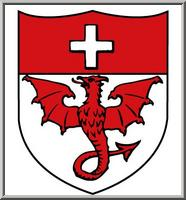 Wappen Saas-Almagell